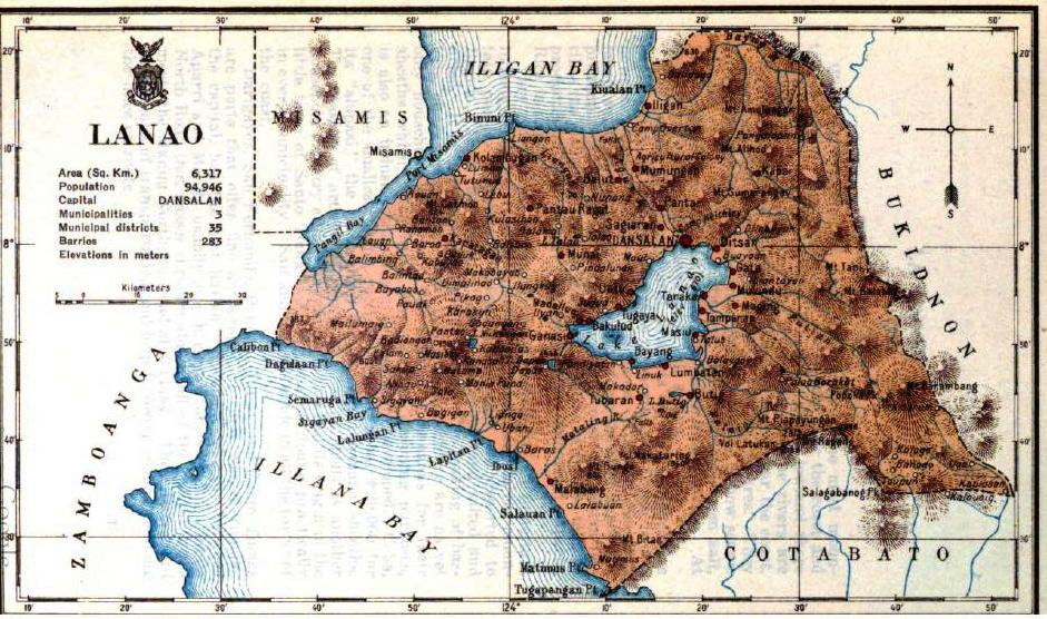 La provincia de Lanao se encuentra al este de la provincia de Zamboanga y al oeste de Bukidnon, la baña por el sudoeste las aguas de la bahía Illana. La forman tres municipios: Dansalan, Iligan y Malabang.